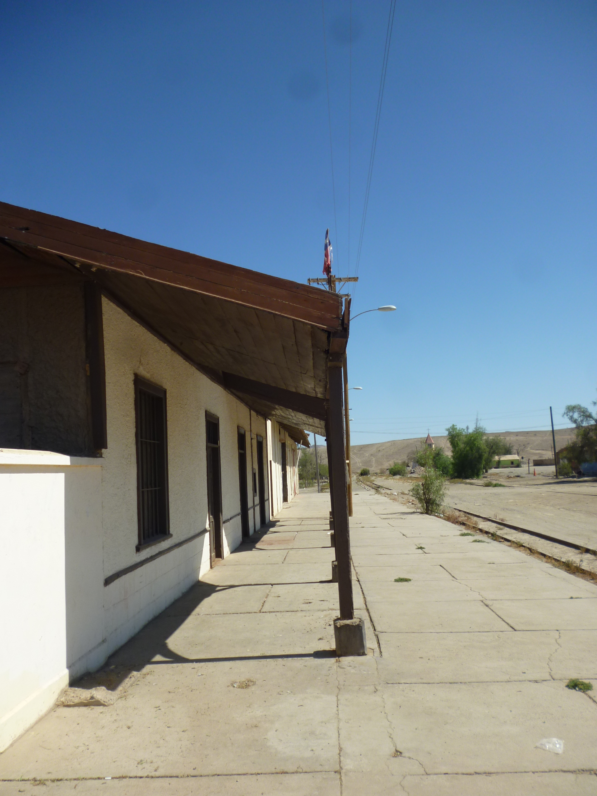 La estacion ya no acoge gente, no hay niños revoloteando en los patios, ni mucho menos hay viajeros... Solo la soledad se hace presente... Nada mas